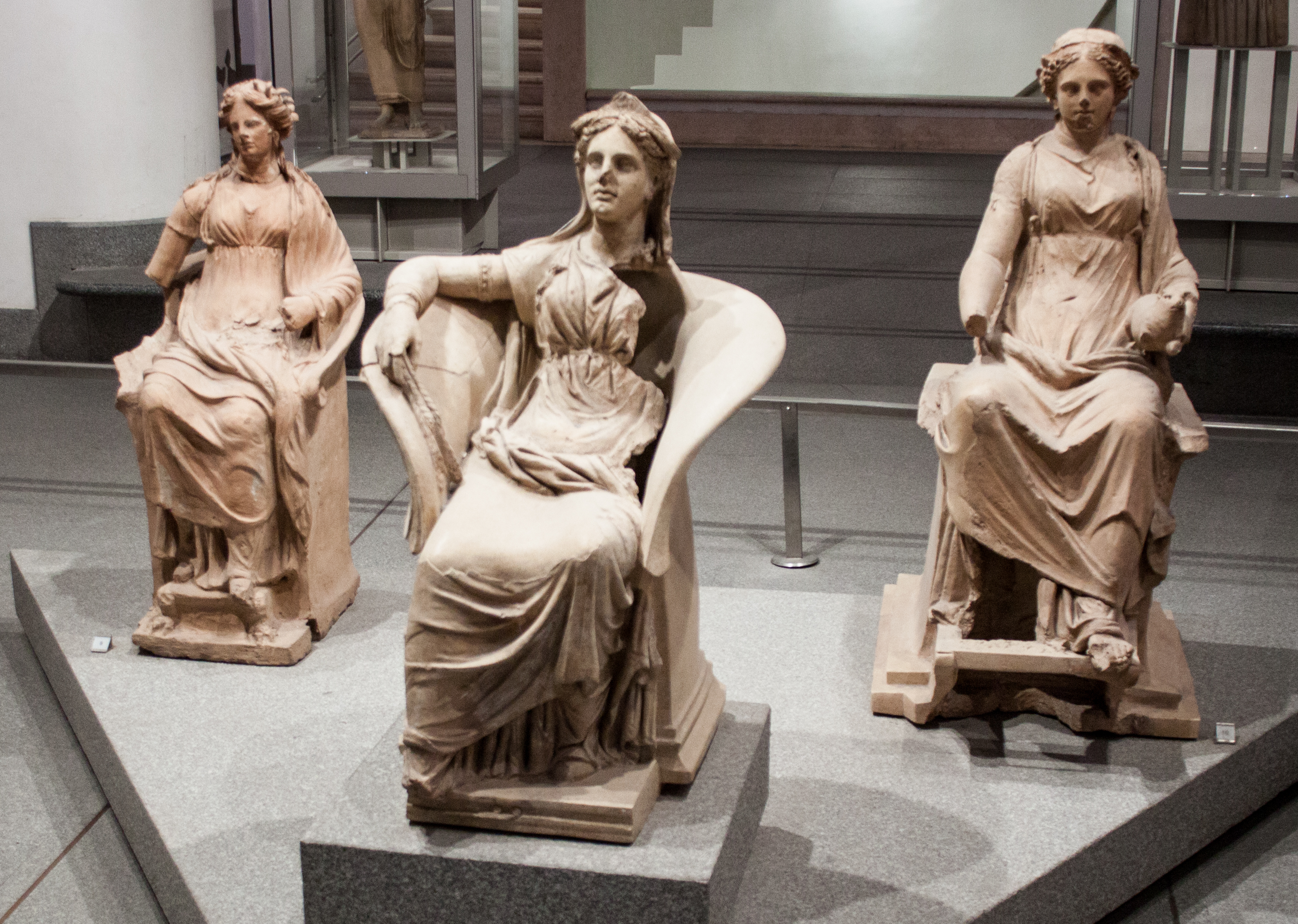 Terracotta sculptures